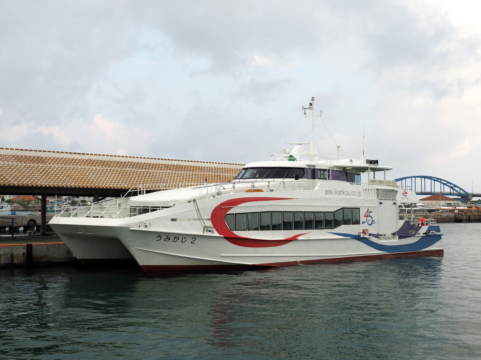 うみかじ2（安栄観光、石垣港離島ターミナルにて）